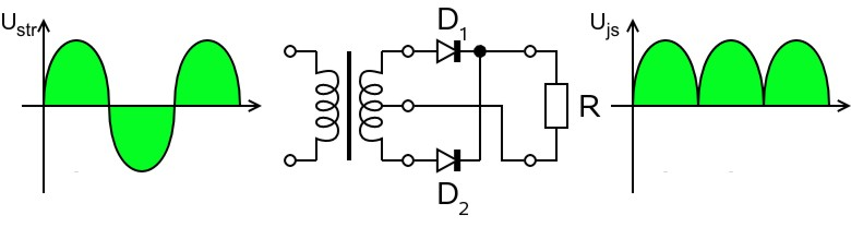 Dvoucestný usměrňovač